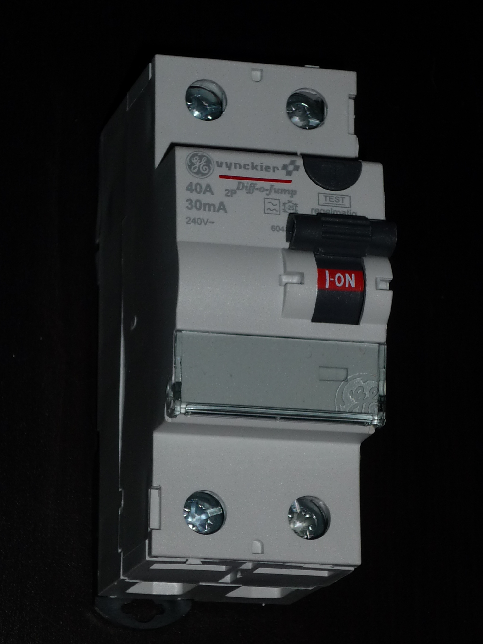 Interrupteur différentiel monophasé de 30 mA